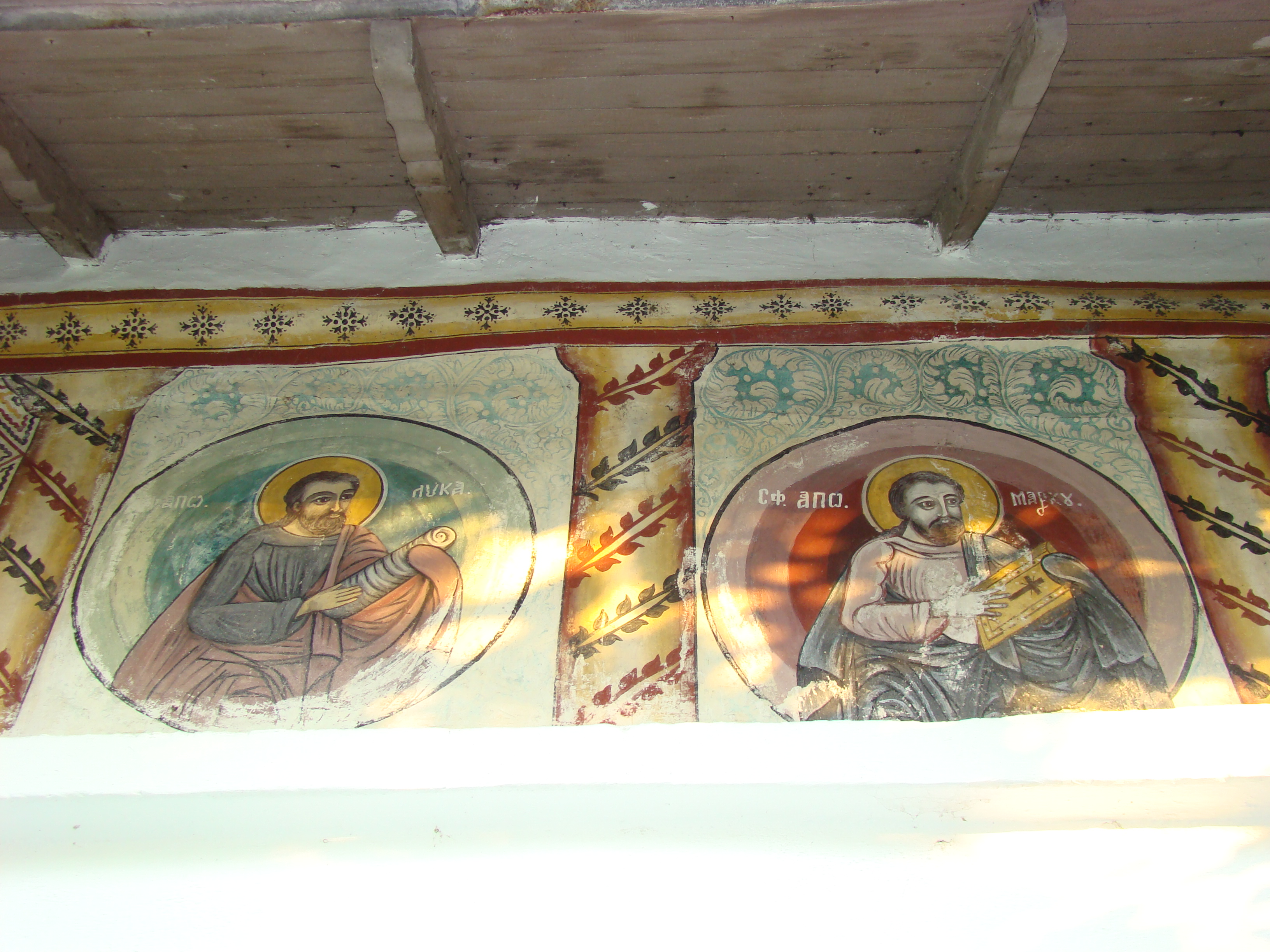 Biserica monument „Sf. Ioan Botezătorul” din Măgura, județul Vâlcea